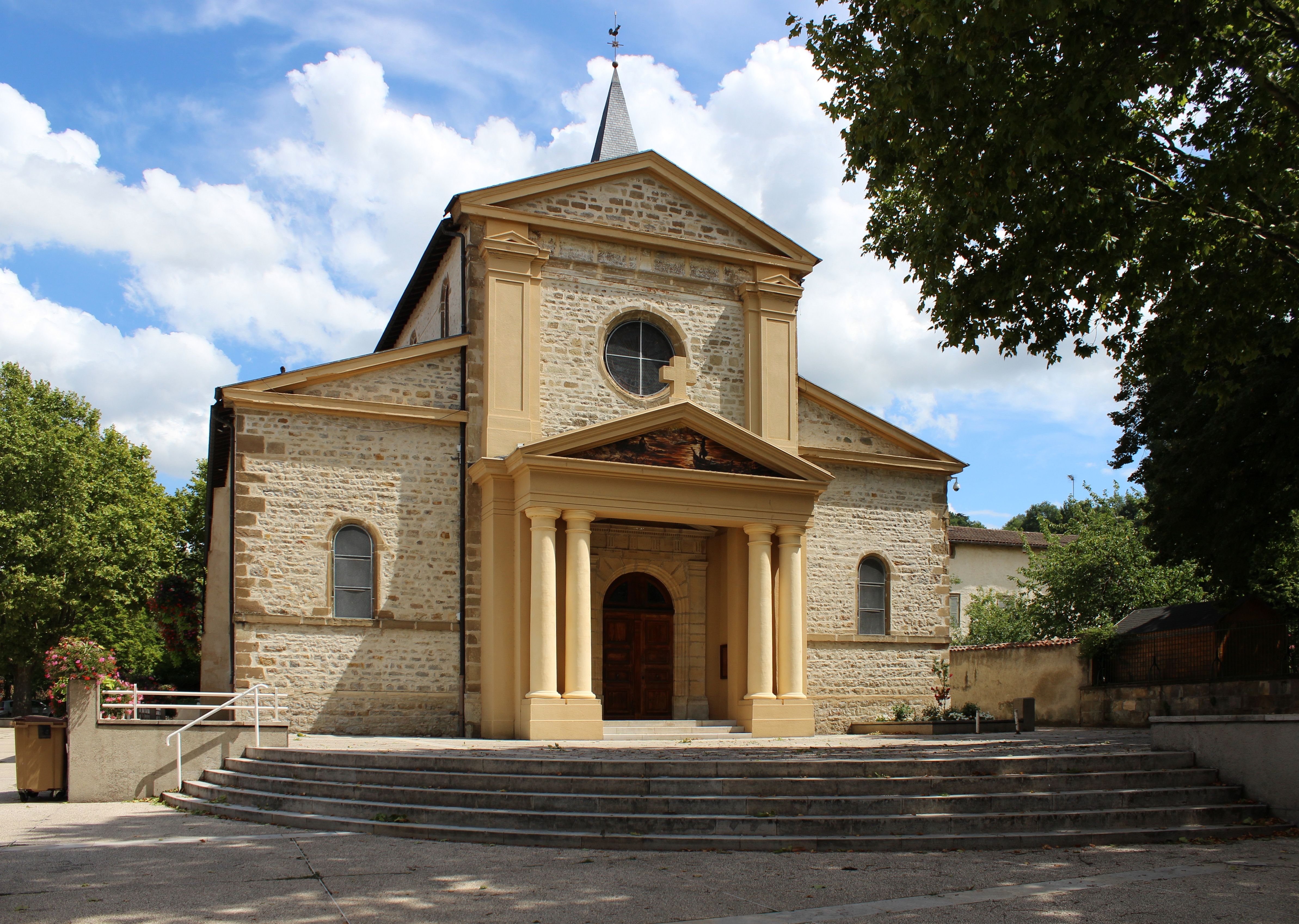 L'église de Saint-Pierre-de-Chandieu.